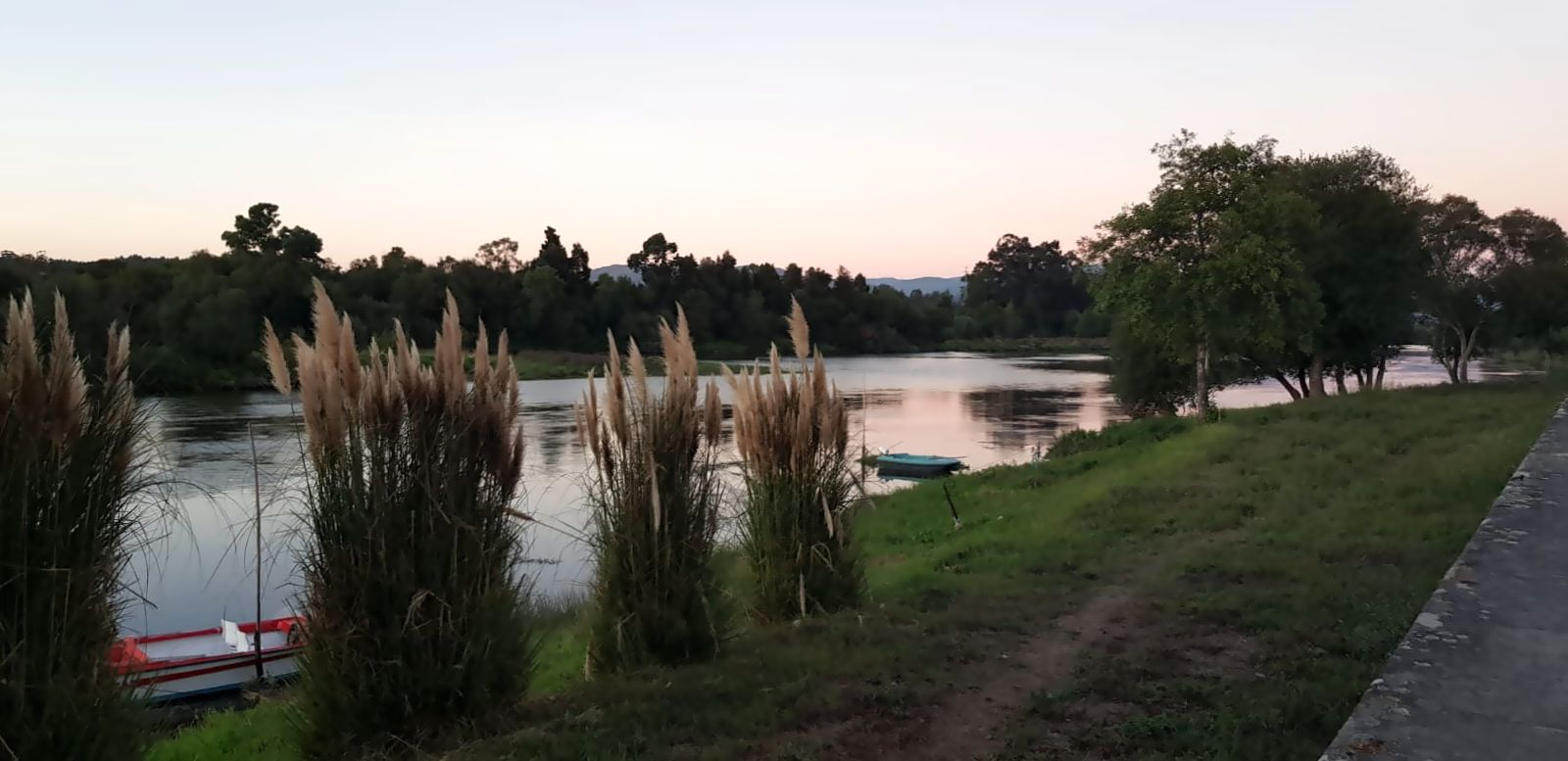 Rio Lima - Vitorino da Donas Vitorino das Donas é uma freguesia portuguesa do concelho de Ponte de Lima, com 4,26 km² de área.